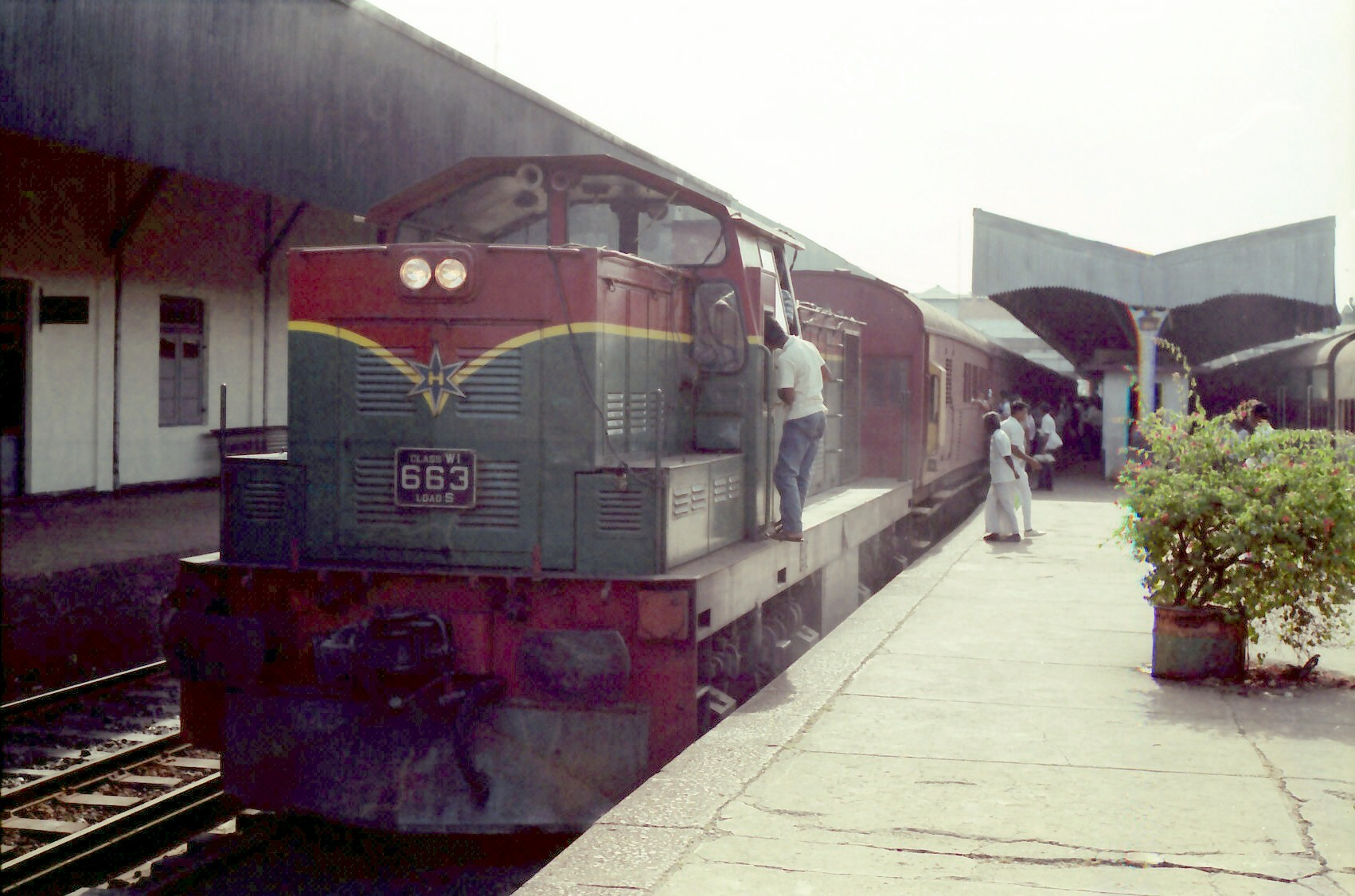 a Henschel at colombo sri lanka